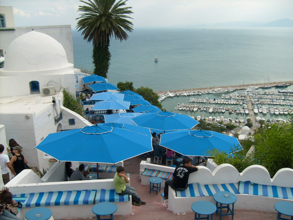 Terrasse du Café des Délices dominant le port de Sidi Bou Saïd (Tunisie)